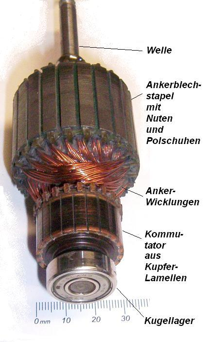 Anker (Trommelanker) eines Gleichstrommotors (Kommutatormotor); hier aus einem Universalmotor einer Staubsauger-Radialturbine